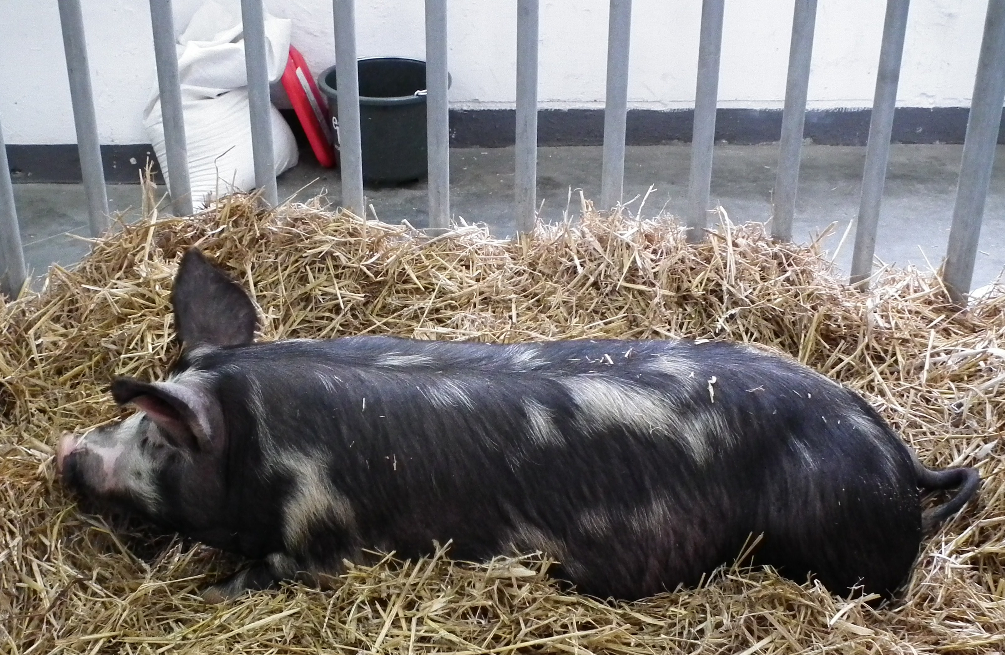 Świnie rasy puławskiej.